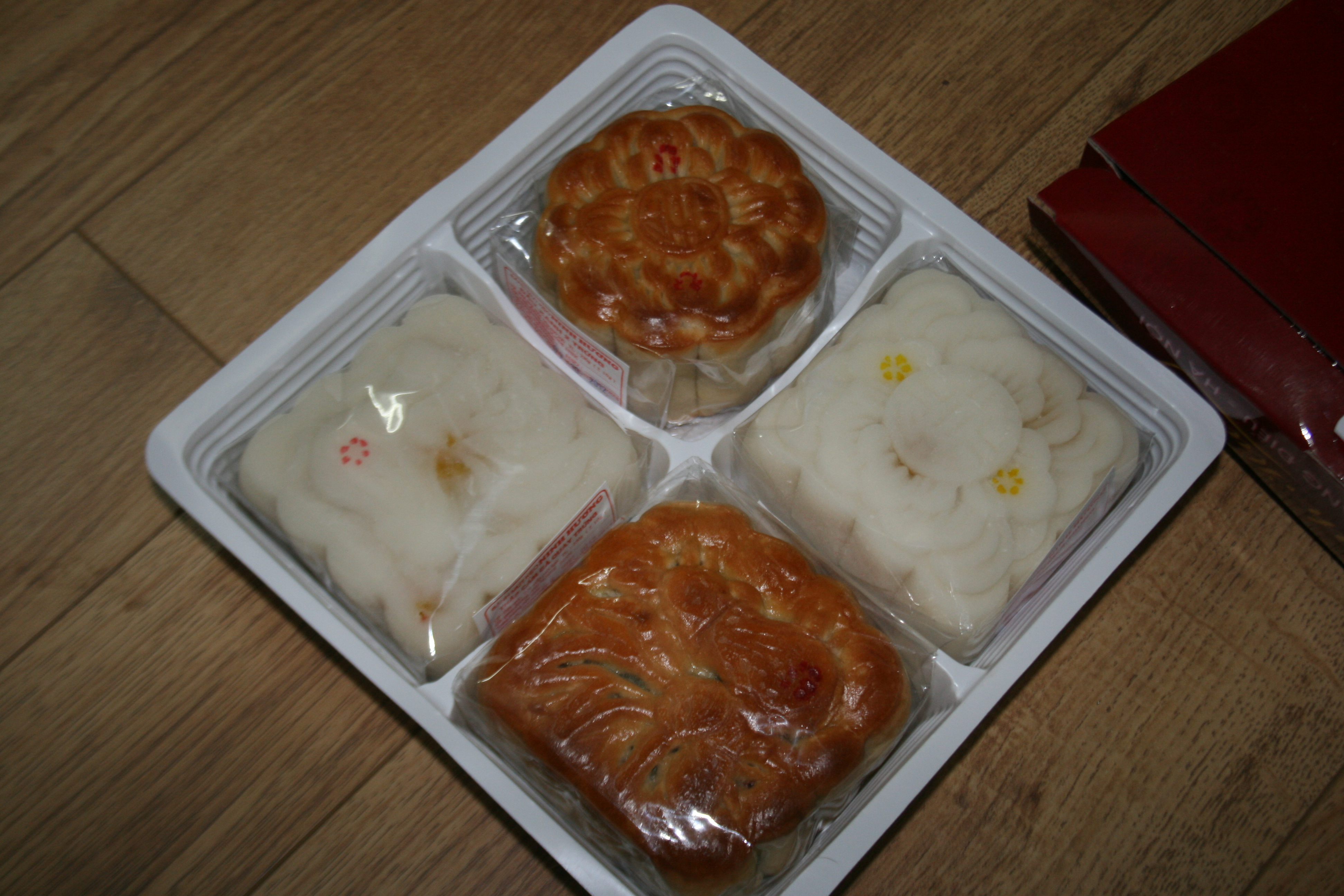 Hai cặp bánh trung thu: bánh nướng nhân đậu xanh trứng mặn và bánh nướng nhân thập cẩm; bánh dẻo nhân đậu xanh trứng mặn và bánh dẻo nhân thập cẩm.